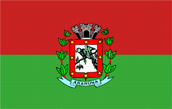 bandeira do municipuo de araruna parana